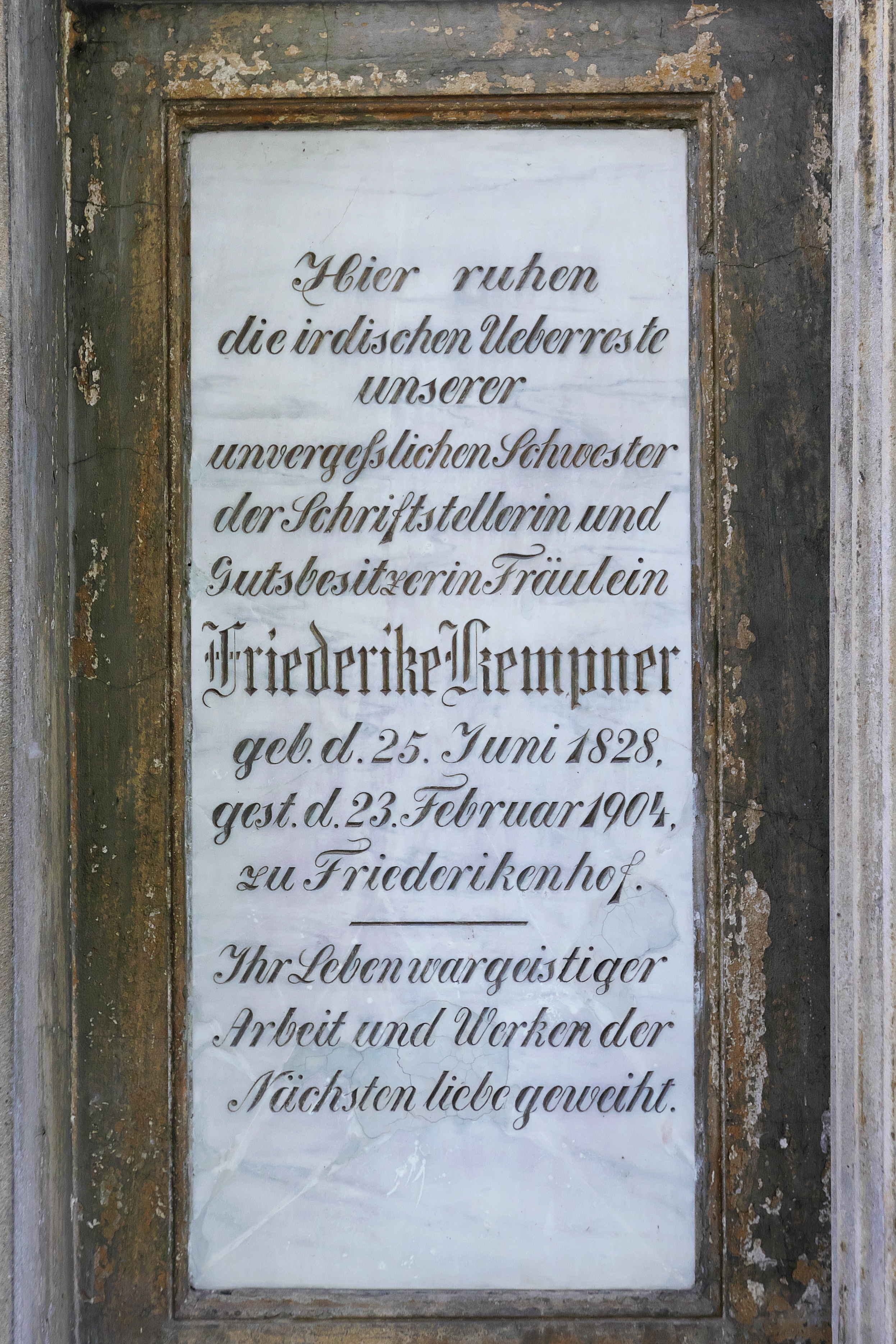 Grabplatte von Friederike Kempner auf dem Alten Jüdischen Friedhof in Breslau, Polen. Aufschrift: "Hier ruhen die sterblichen Überreste unserer unvergesslichen Schwester, der Schriftstellerin und Gutsbesitzerin Fräulein Friederike Kempner geboren den 25. Juni 1828, gestorben den 23. Februar 1904 zu Friederikenhof. Ihr Leben war geistiger Arbeit unf Werken der Nächstenliebe geweiht."